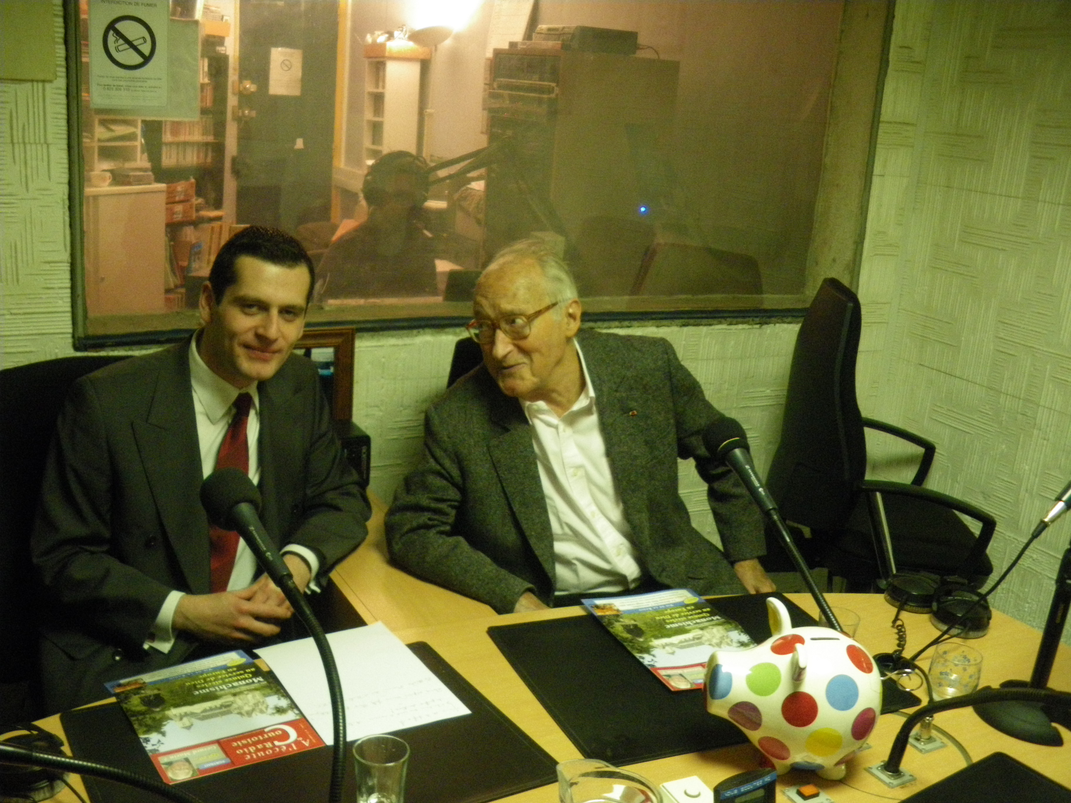 lors d'une émission de radio pour la sortie d'Alexandre Dumas et la Cité Princière